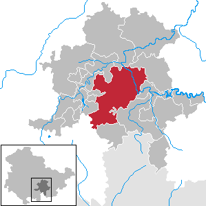 Saalfeld/Saale in Thuringia - District Saalfeld-Rudolstadt